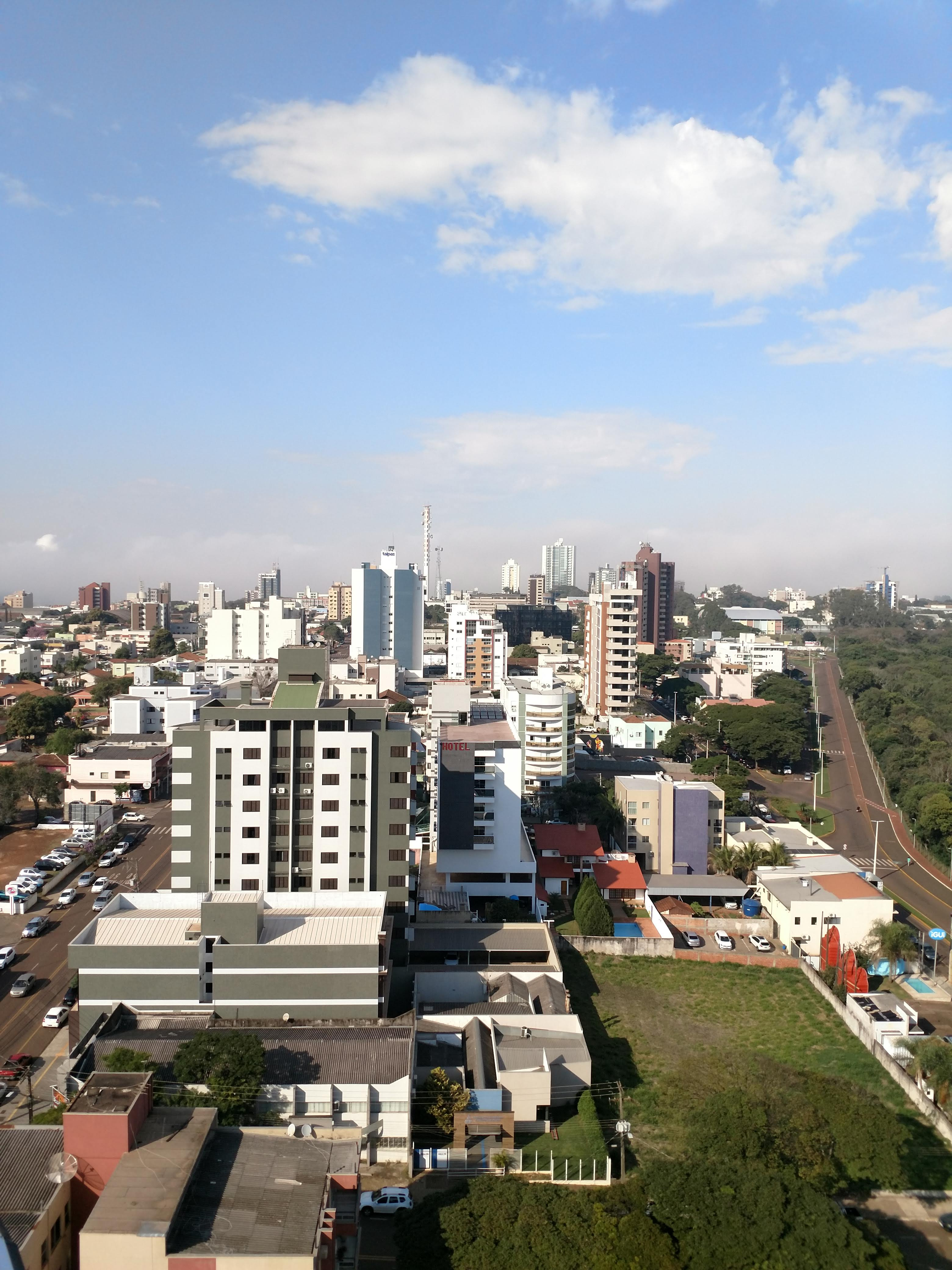 Vista do centro de Toledo.